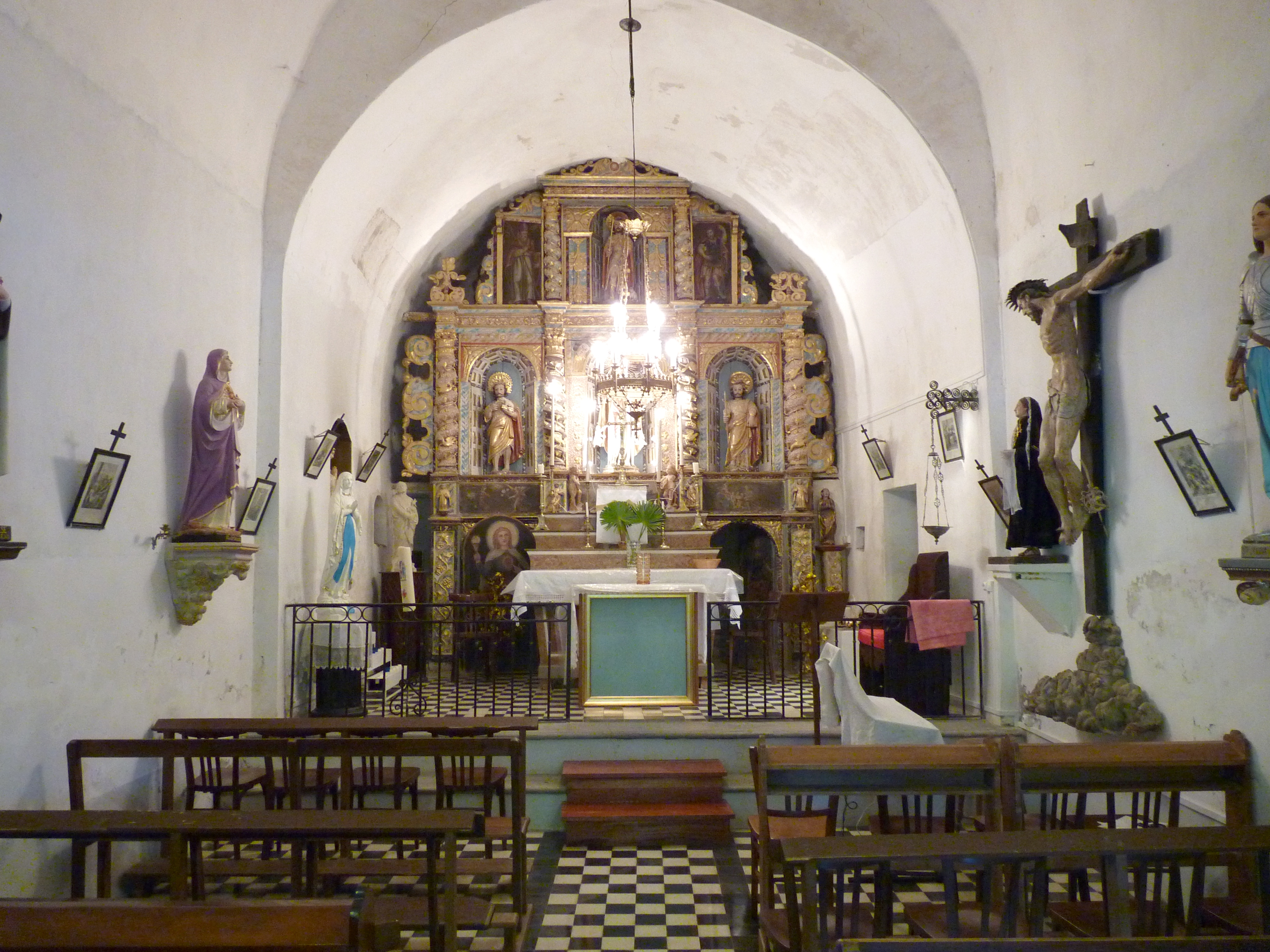 L'intérieur de l'église Sainte-Marie de Villa de Gennon (15 février 1114), Le Vila, Reynès (Pyrénées-Orientales, Languedoc-Roussillon, France)